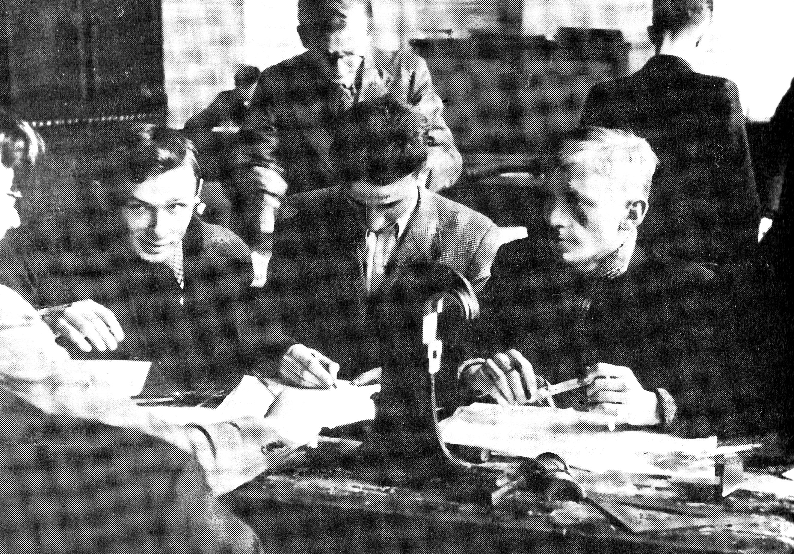 Jan Bytnar (pierwszy z prawej) z kolegami w czasie zajęć w Państwowej Wyższej Szkole Budowy Maszyn i Elektrotechniki im. H. Wawelberga i S. Rotwanda